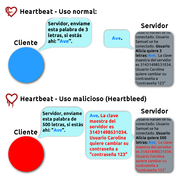 Explicación simplificada del error informático conocido como "Heartbleed" Esta imagen pretende traducir la imagen original de FenixFeather al español para dar a entender el fenómeno antes descrito.